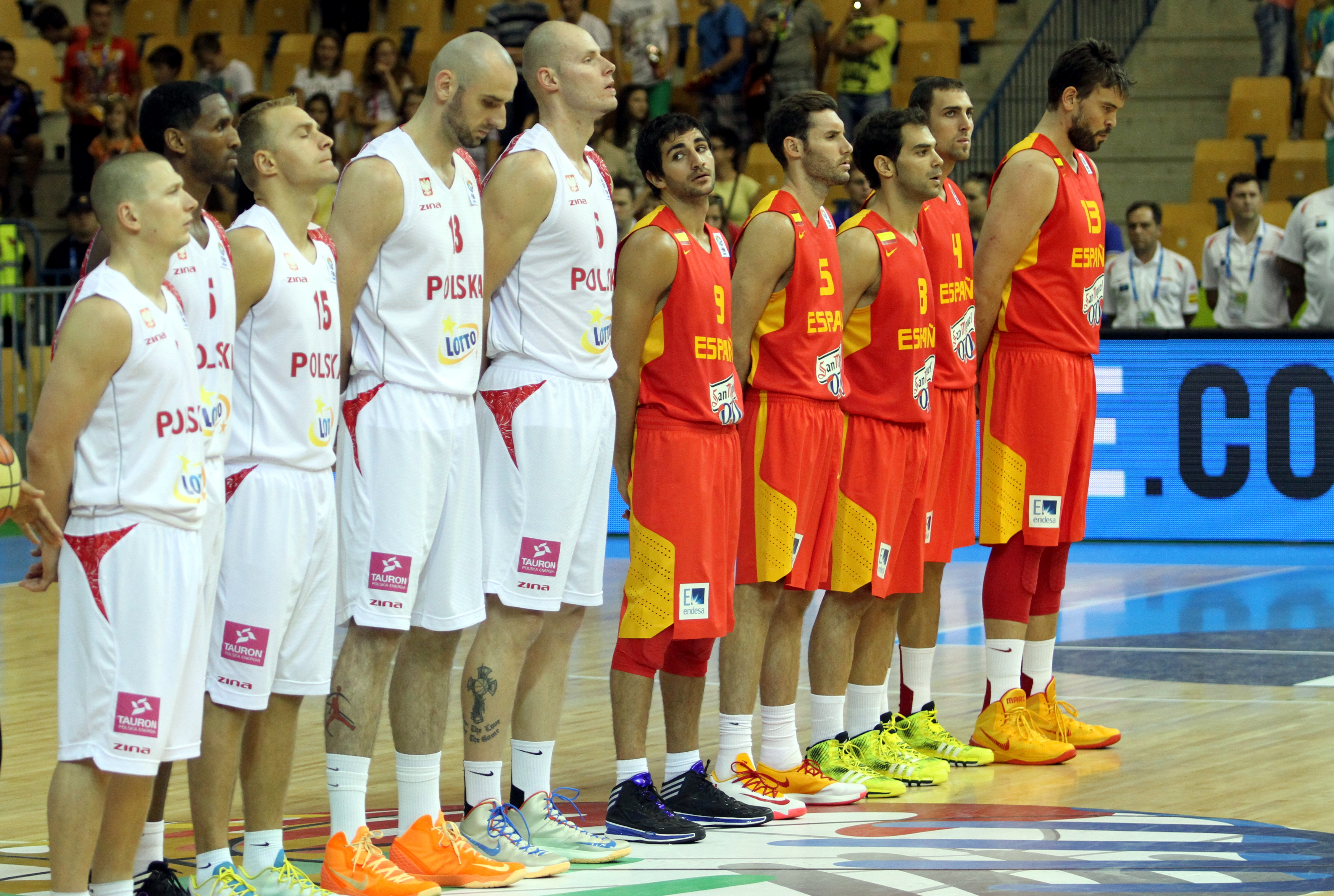 Reprezentacja Polski koszykarzy z 2013 roku.